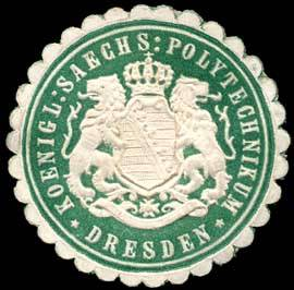 Sealing stamp Title: Koeniglich Saechsisches Polytechnikum - Dresden Description: grün, weiß, geprägt Place: Dresden size: 3 cm